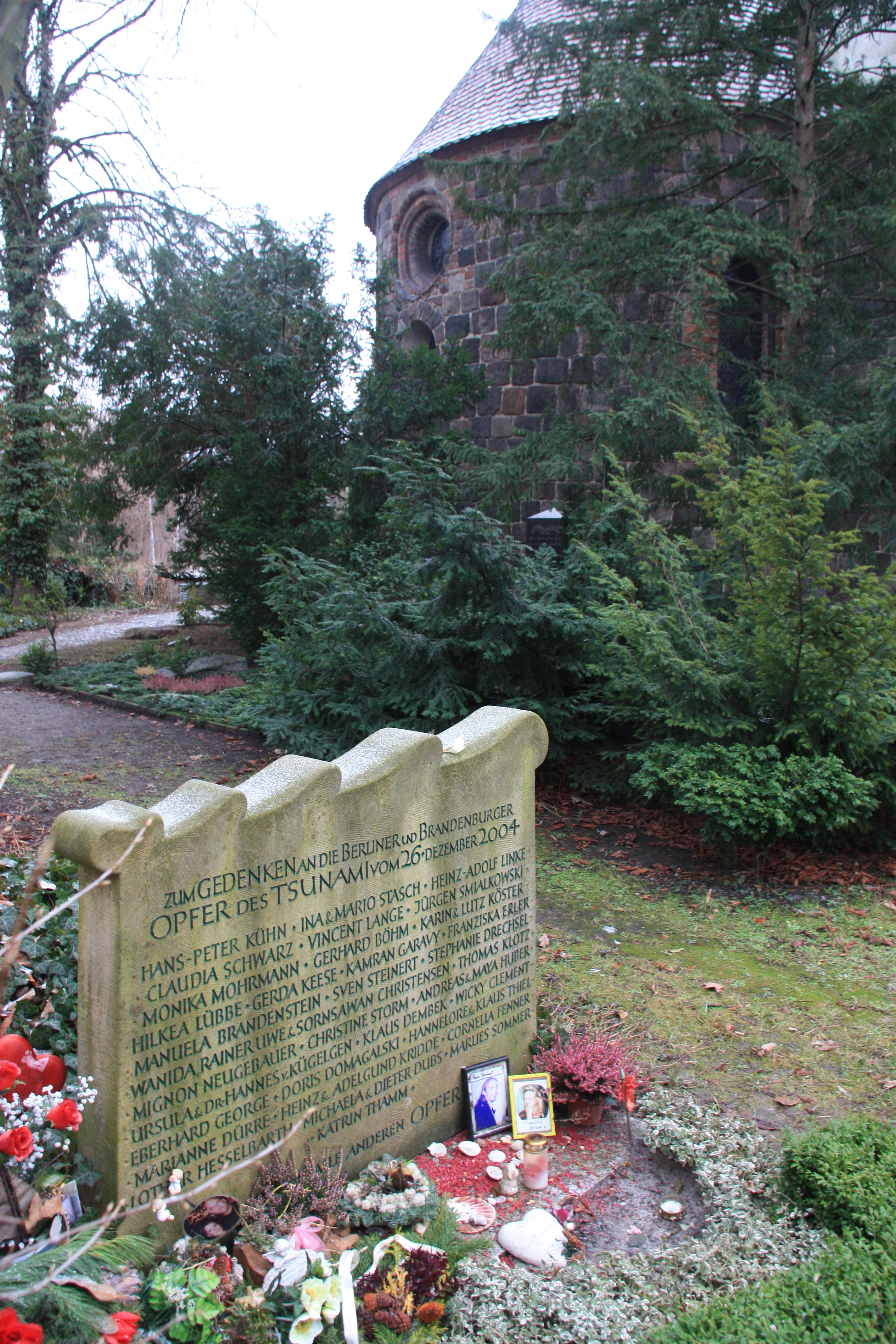 Gedenkstein für die Opfer des Tsunami vom 26. Dezember 2004 aus Berlin und Brandenburg an der Dorfkirche Tempelhof